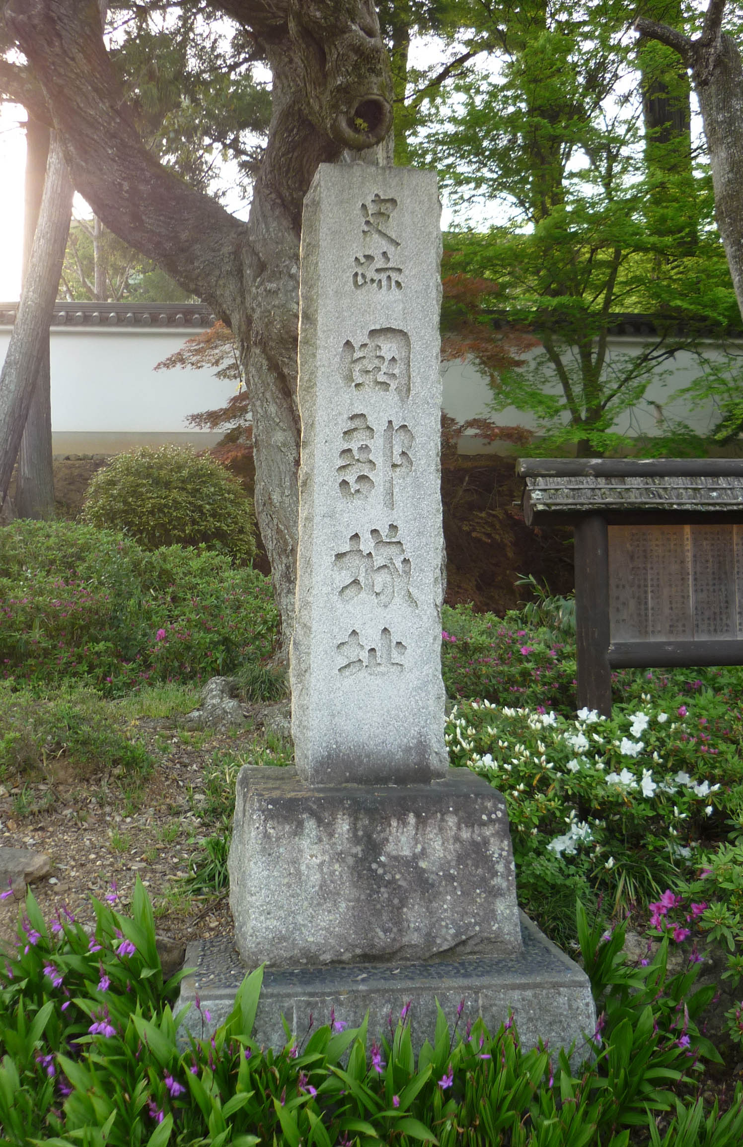 園部城の石標